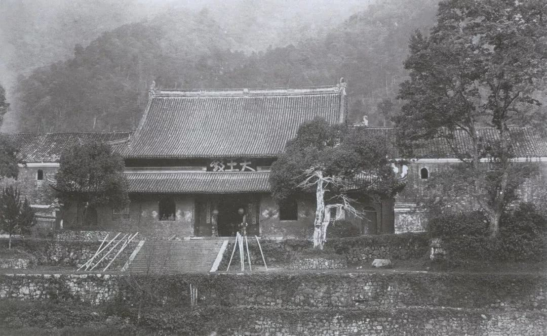 19世纪70年代天童寺天王殿